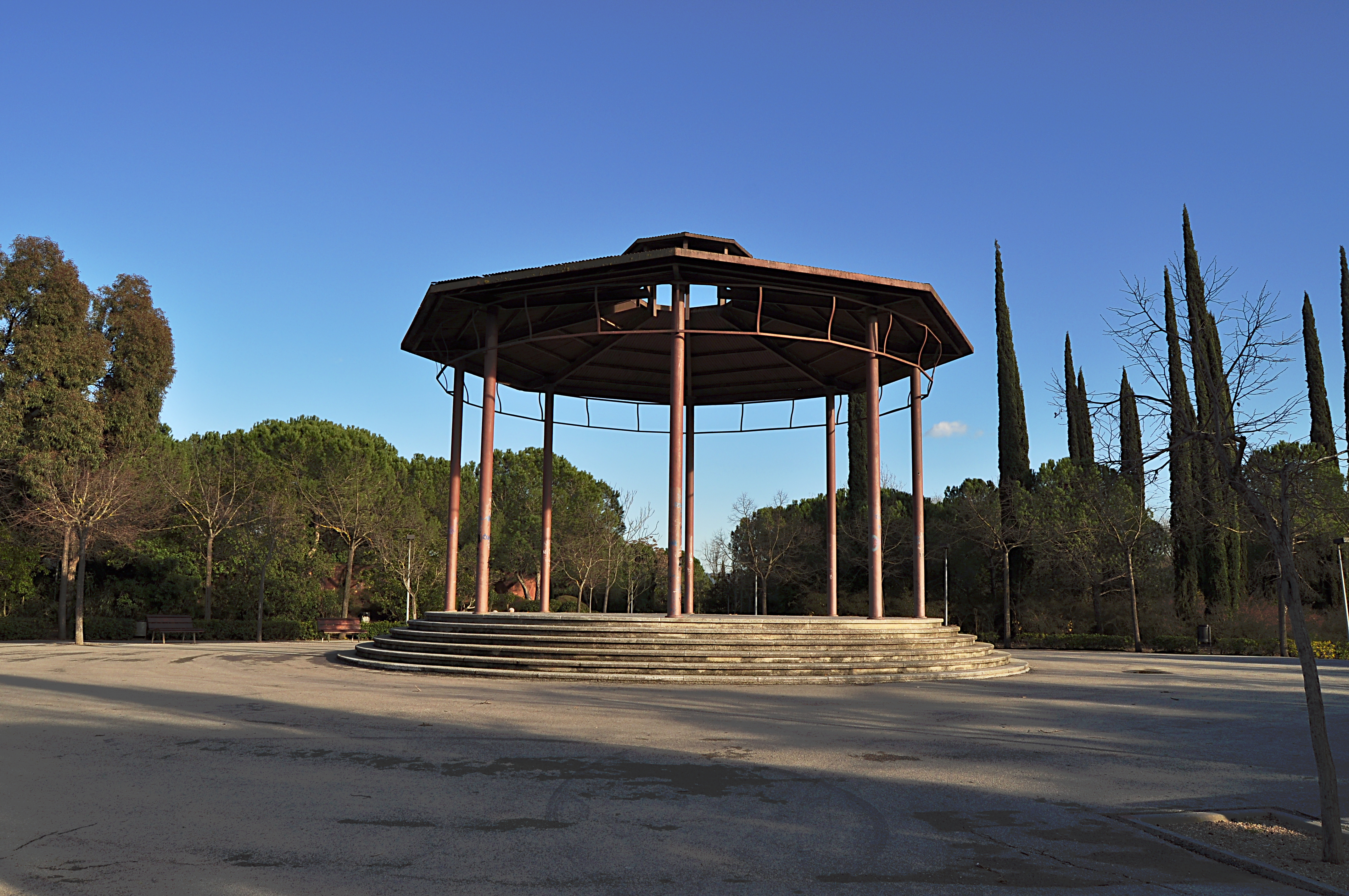 Mollet del Vallès: Parc de Plana Lledó (Vallès Oriental).